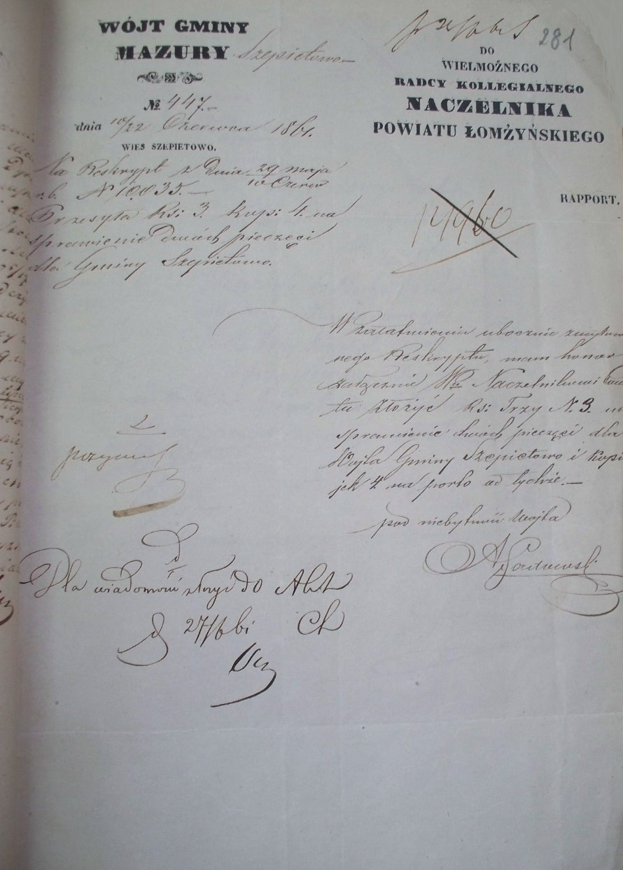 Pismo na którym figuruje podpis pierwszego wójta gminny Szepietowo - Aleksandra Kierznowskiego.